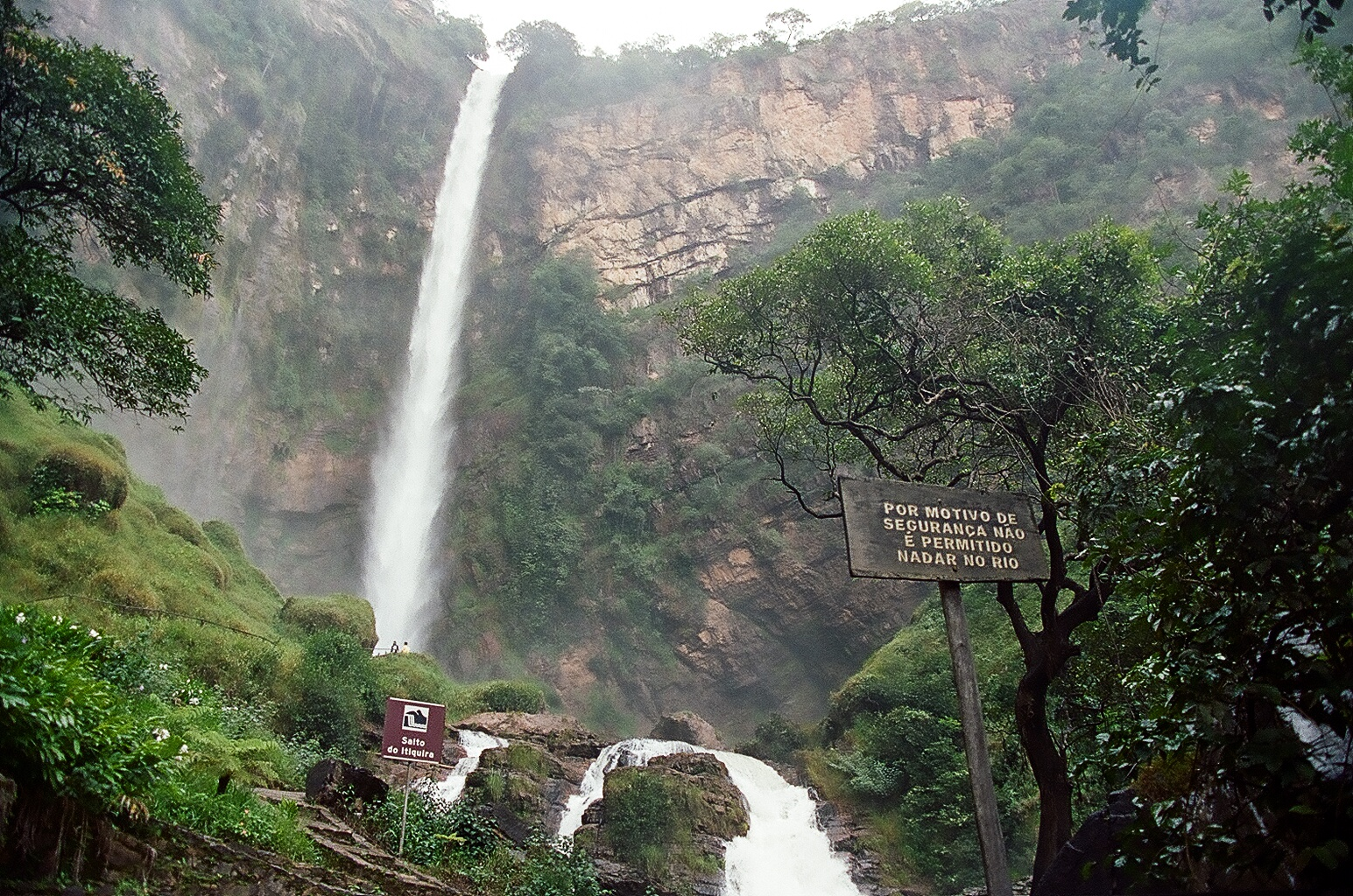 Cachoeira do Itiquira - Formosa - Goiás - Brasil